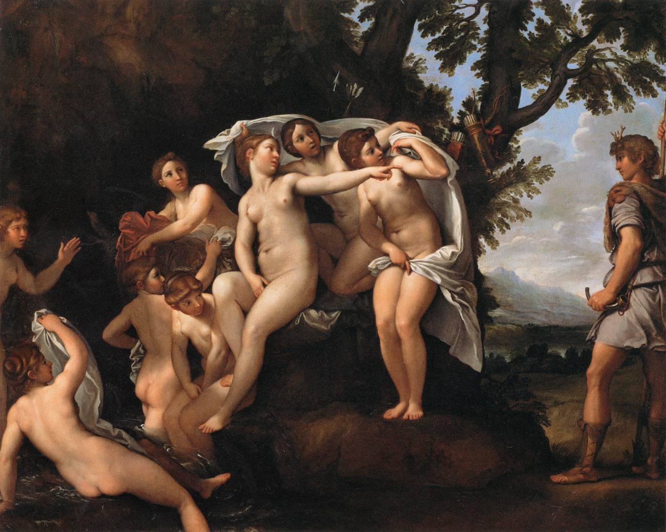 See Details (Détails – Particulari – Detalles)